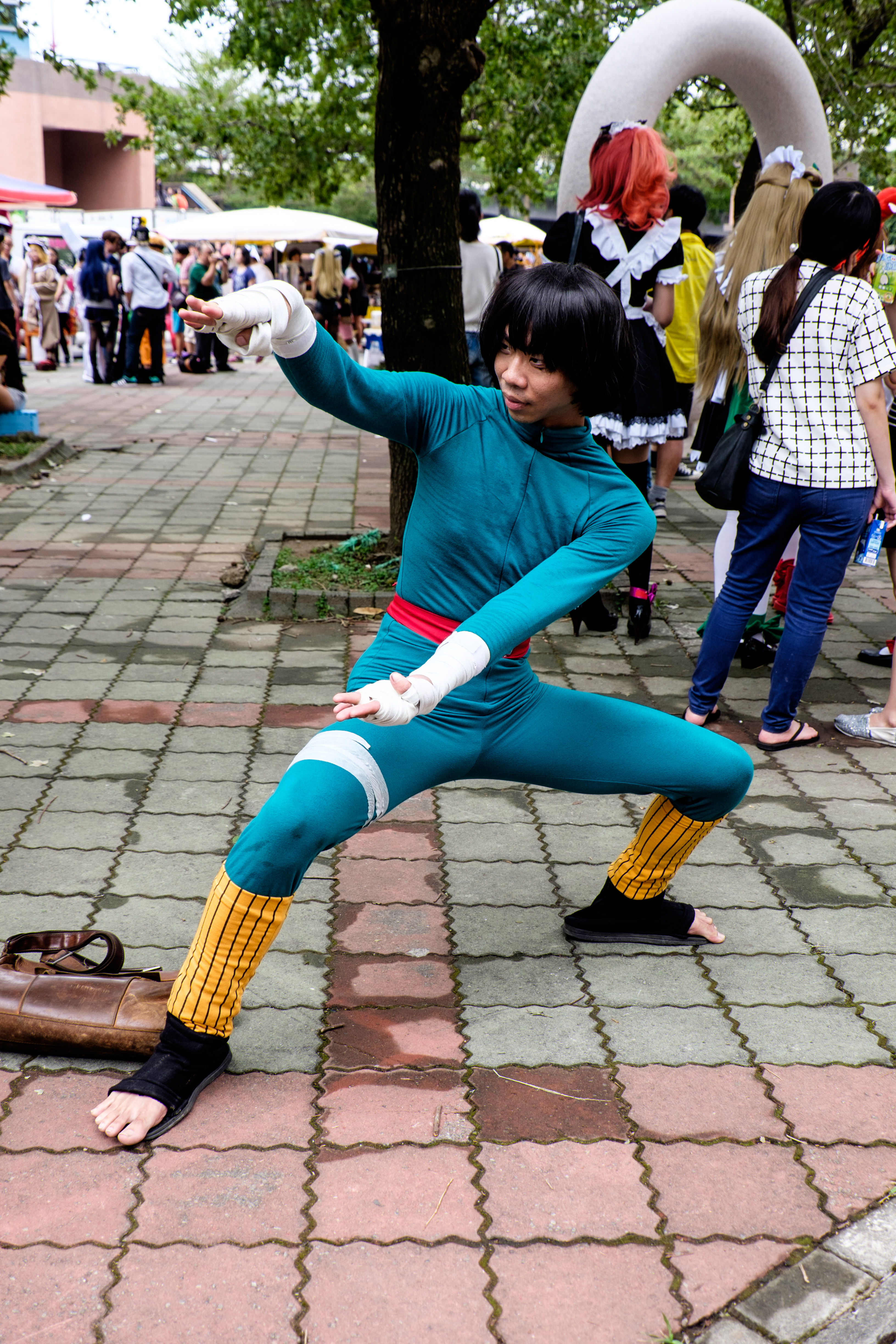 CWT40下午，＜Naruto＞李洛克Cosplayer。